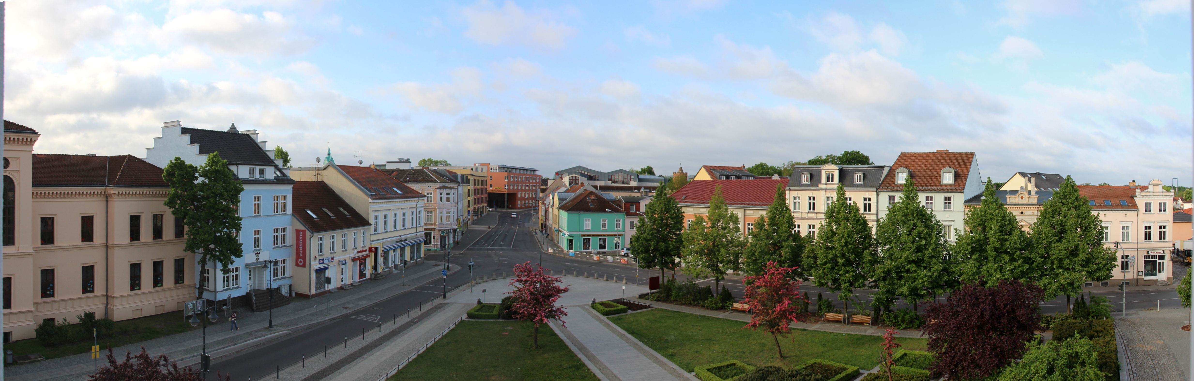 Fürstenwalde/Spree : Rundblick vom Hotel Kaiserhof aus